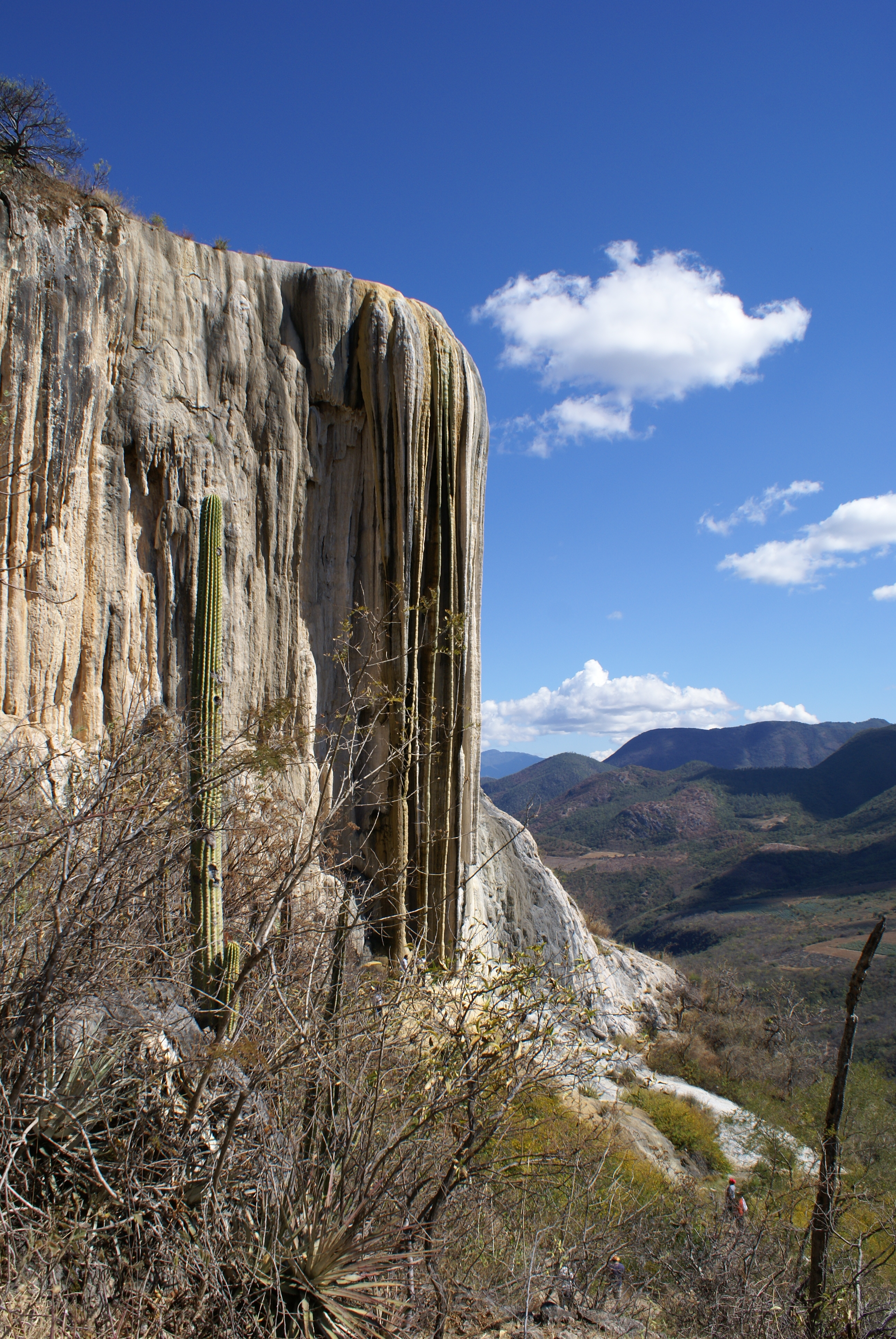 Vista oeste de la "cascada" de Hierve el Agua.